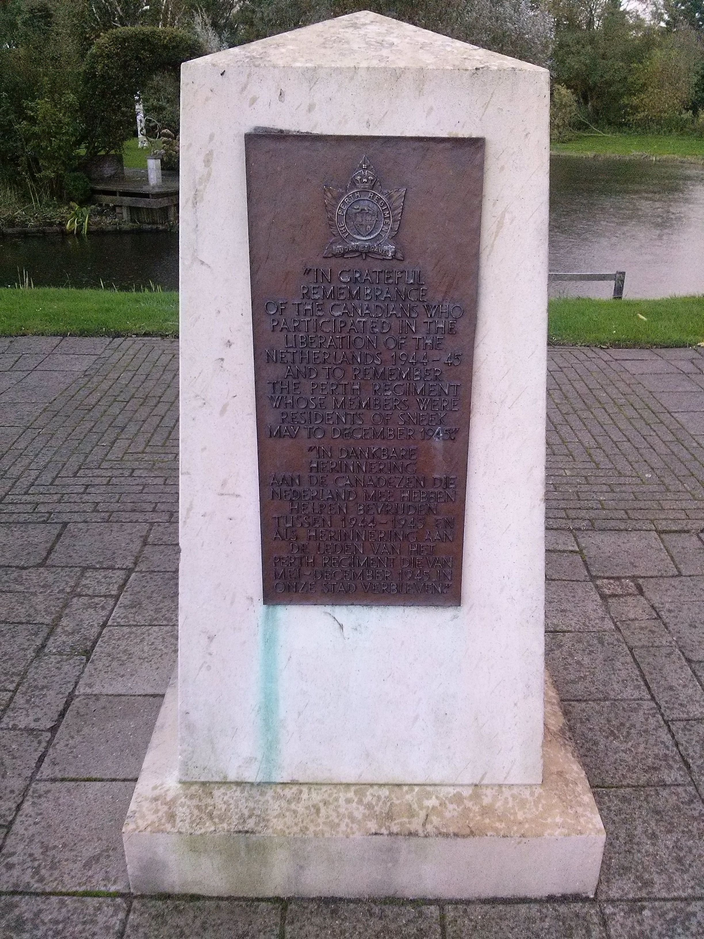 Het monument op het Regiment Perthplein te Sneek is een stenen gedenkzuil met ingemetselde plaquette. Het is opgedragen aan de Canadese bevrijders uit het Regiment Perth, die Sneek aan het eind van de Tweede Wereldoorlog hebben bevrijd.